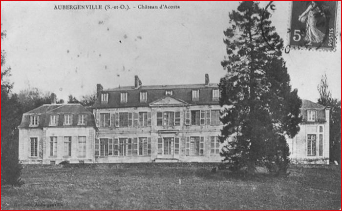 Château d'Acosta à Aubergenville (Yvelines)